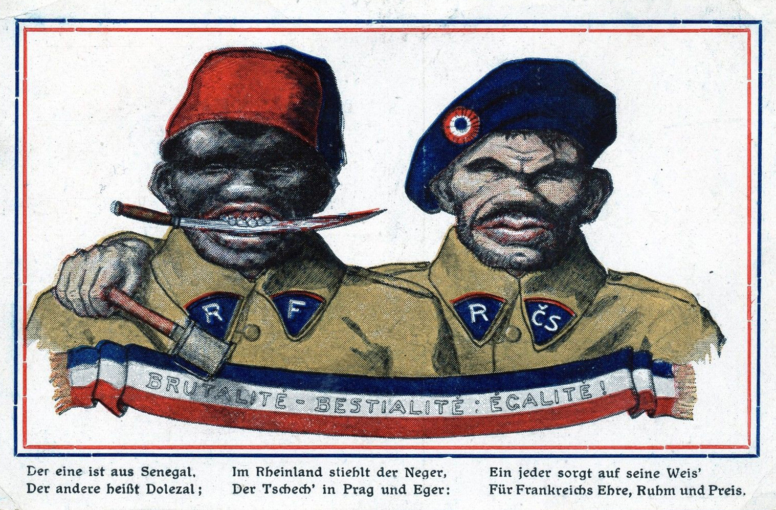 Carte postale antifrançaise et anti-tchèque expédiée d'Allemagne en décembre 1922 ou janvier 1923.